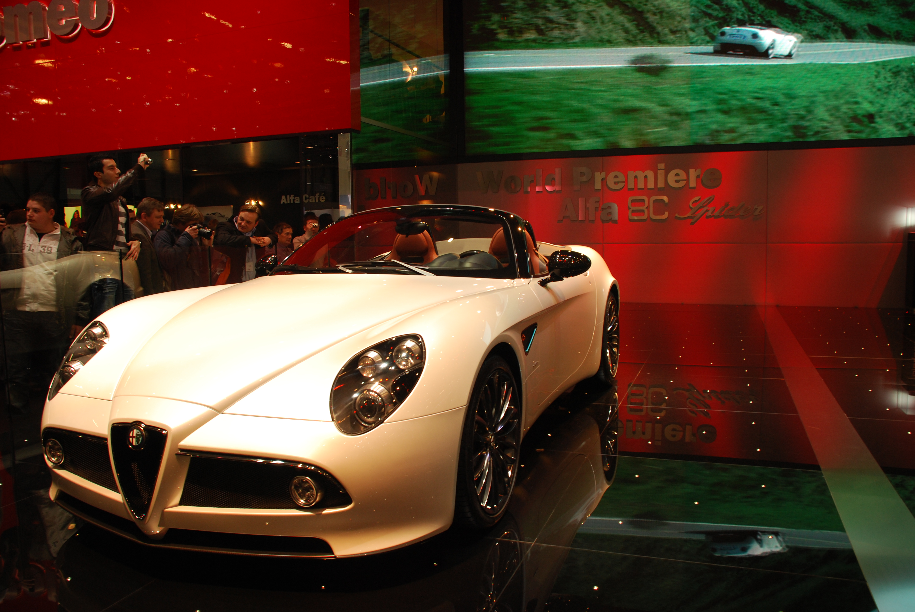 Alfa 8C SpiderAlfa 8C Spyder